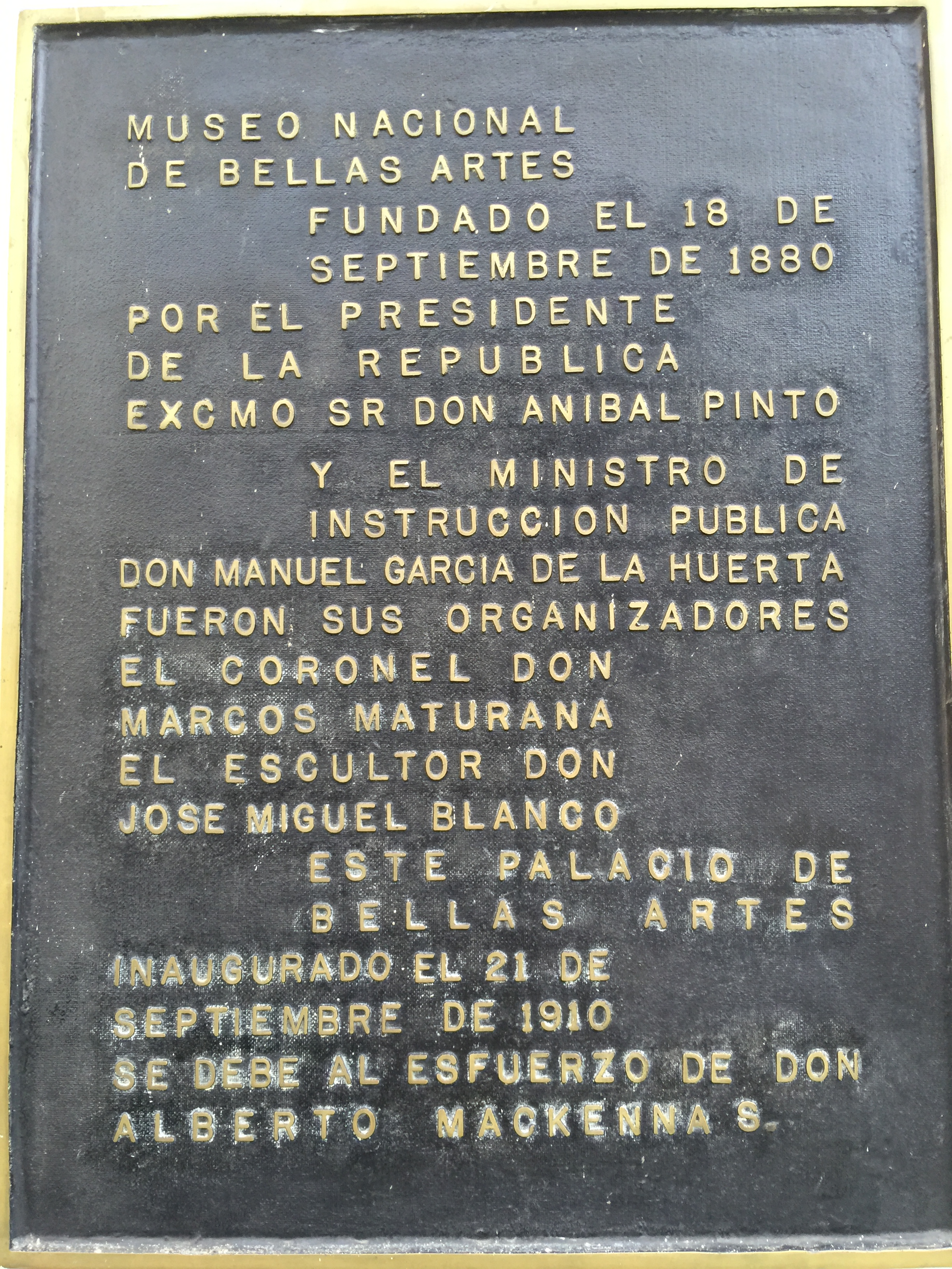 Placa en el acceso de Museo Nacional de Bellas Artes de 1910